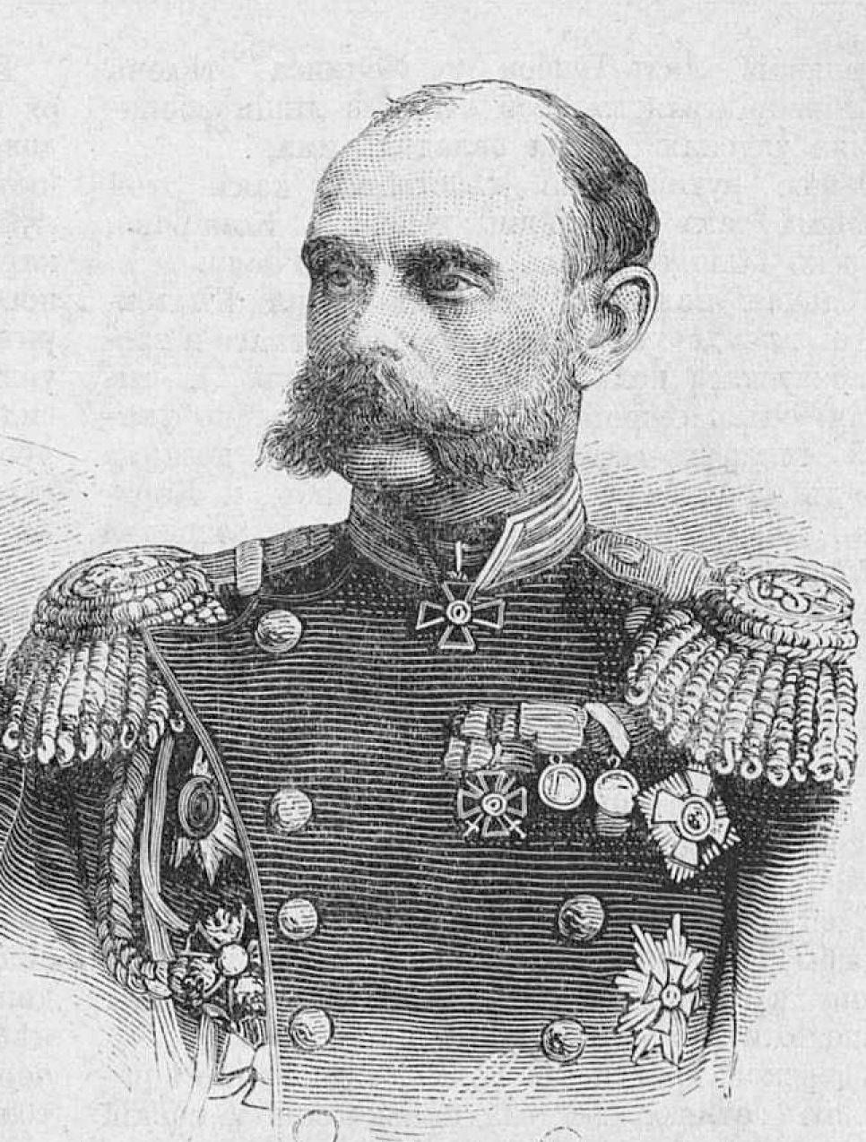 Генерал-майор Розенбах Николай Оттонович, 1877 год